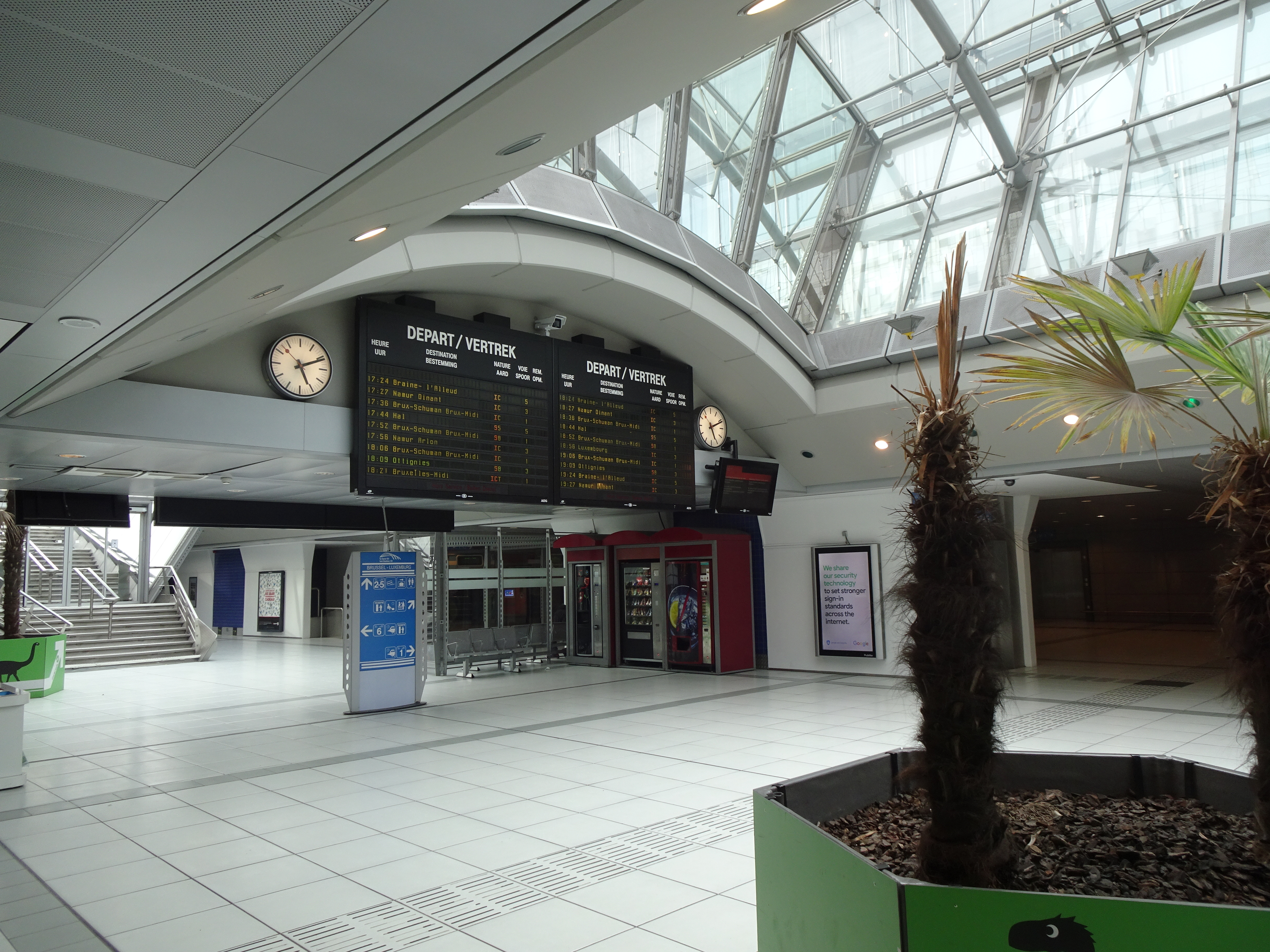 Hall de la gare de Bruxelles-Luxembourg et tableau des départs. Ce grand tableau fut supprimé fin 2019 et remplacé par des écrans classiques.